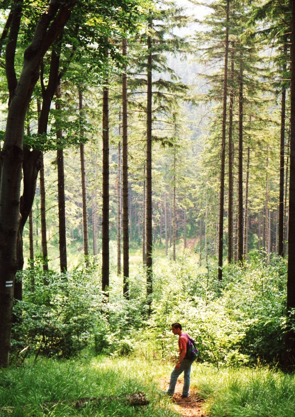 Zejście z Sokółki w Górach Kamiennych.